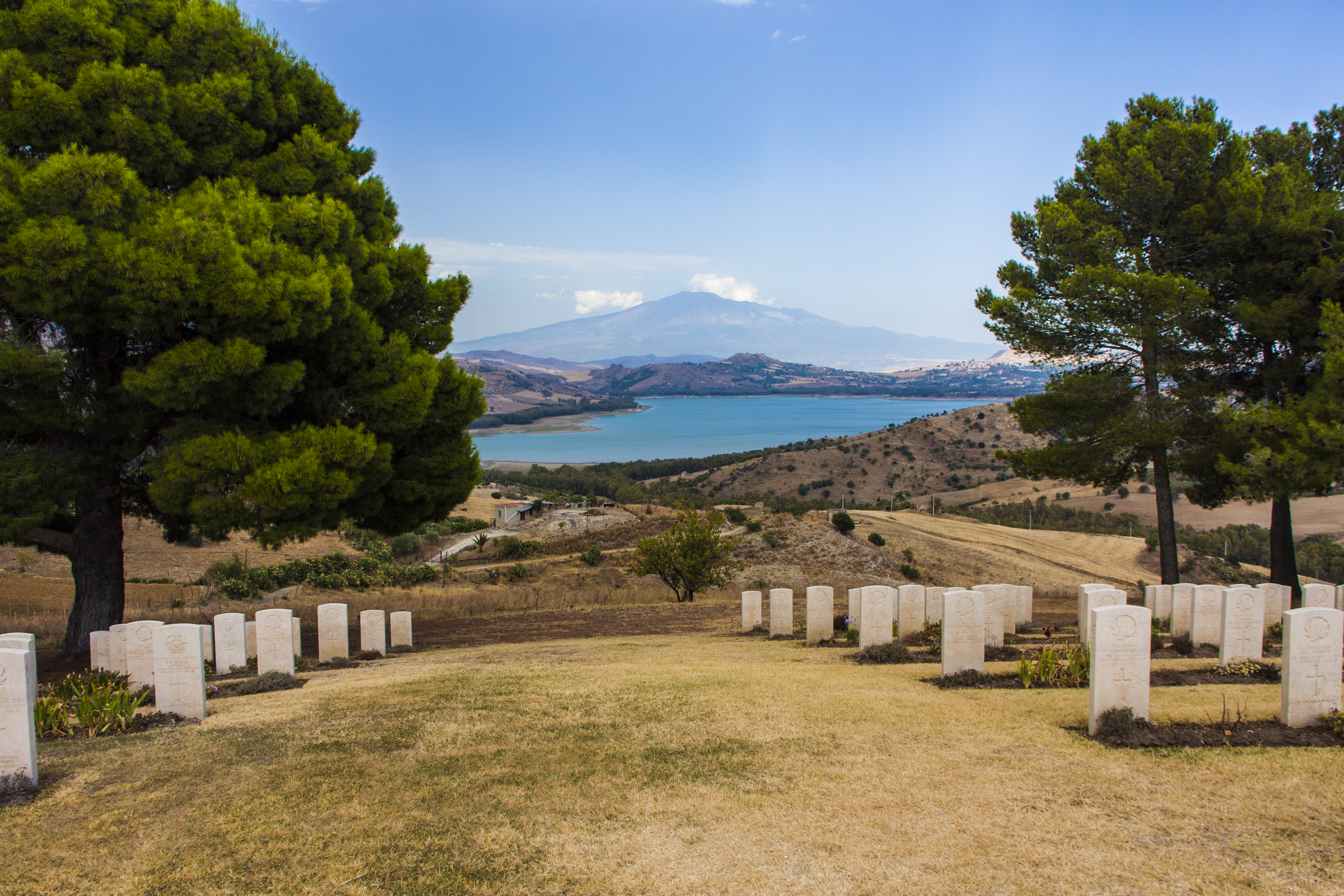 Etna e lago Pozzillo